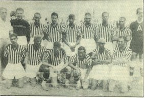 Time: Copa dos Campeões Estaduais